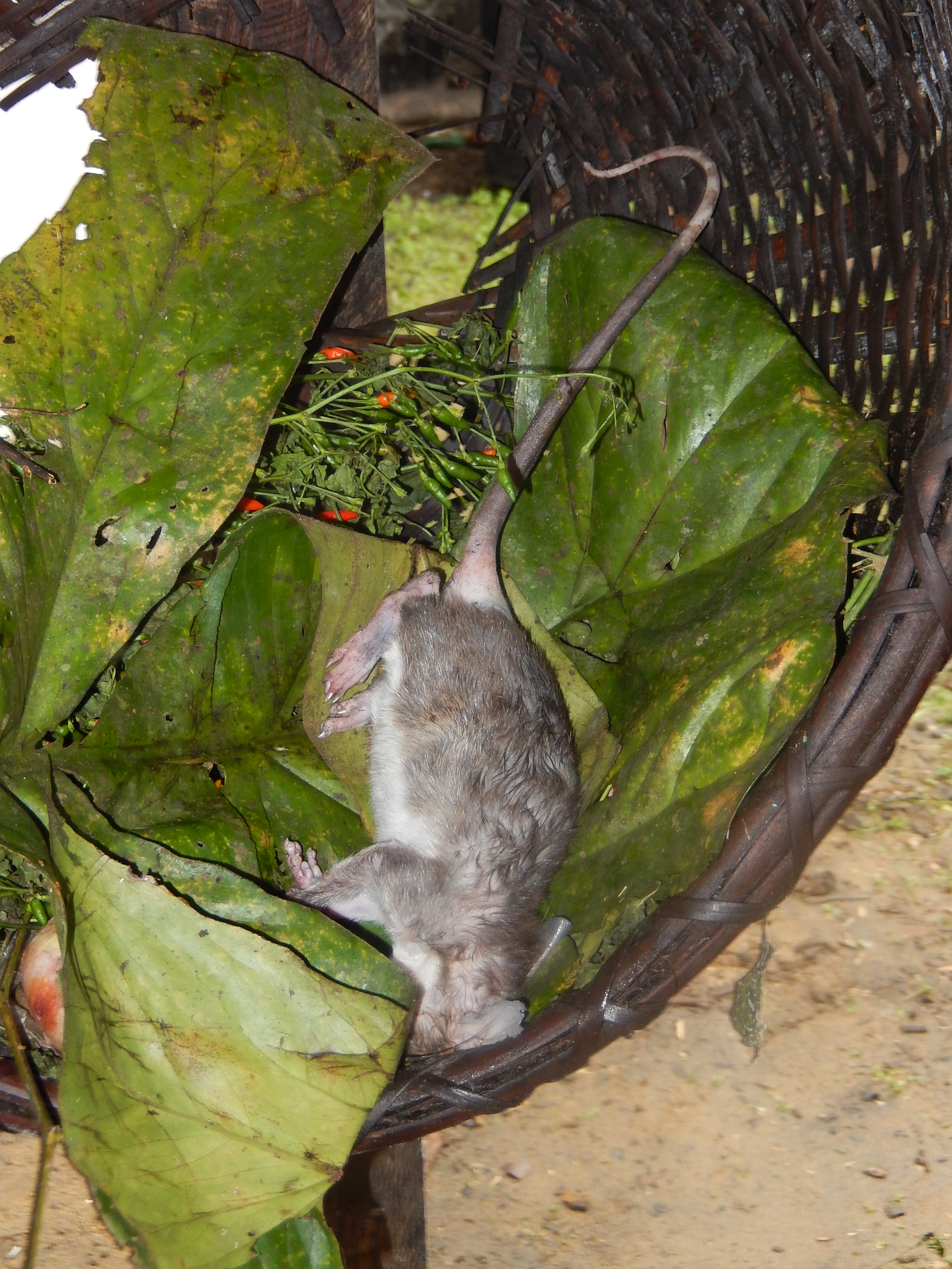 Cricetomys gambianus (Tayap, Cameroun)